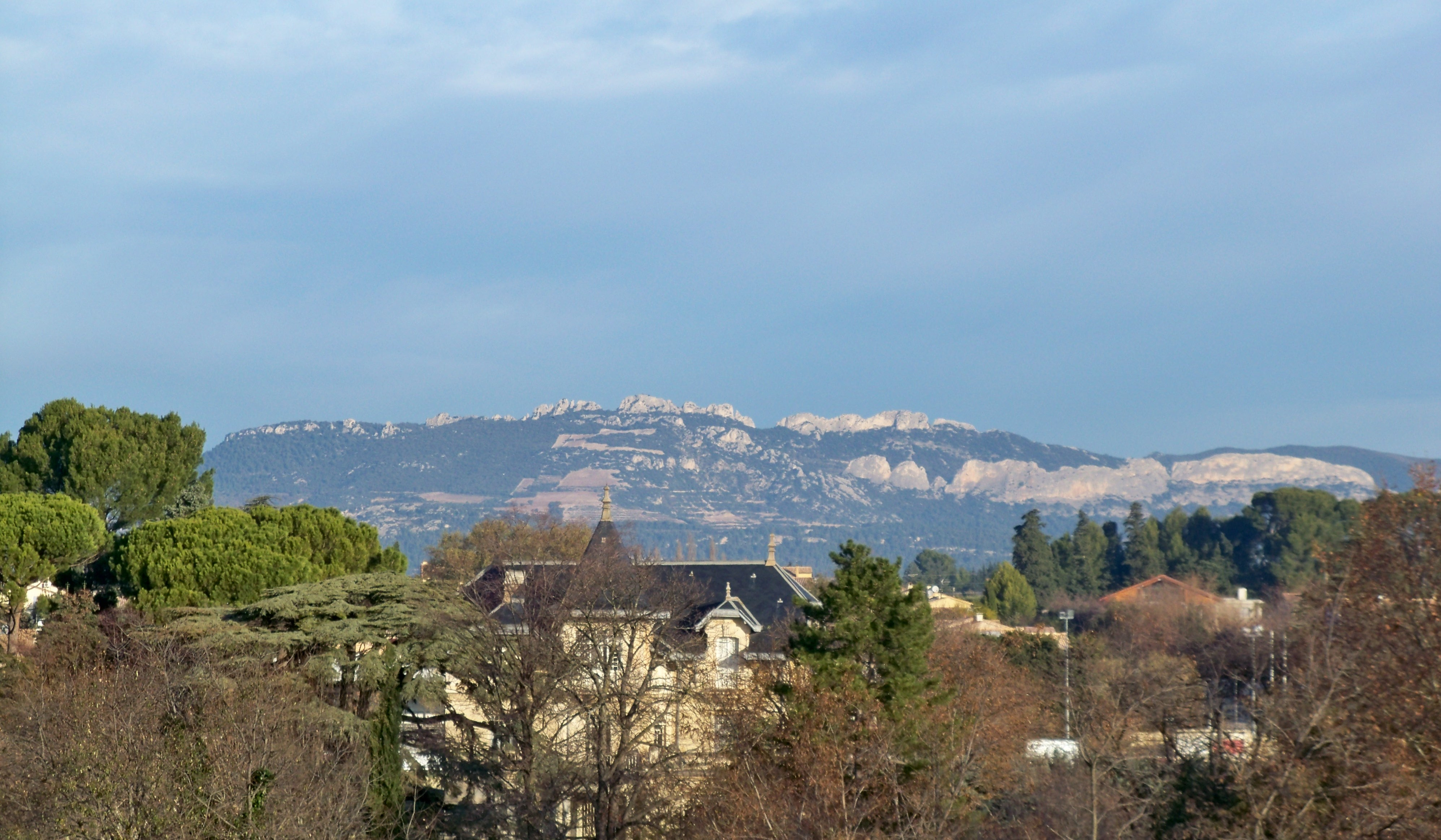 Les Dentelles de Montmirail vue de Carpentras, Vaucluse, France